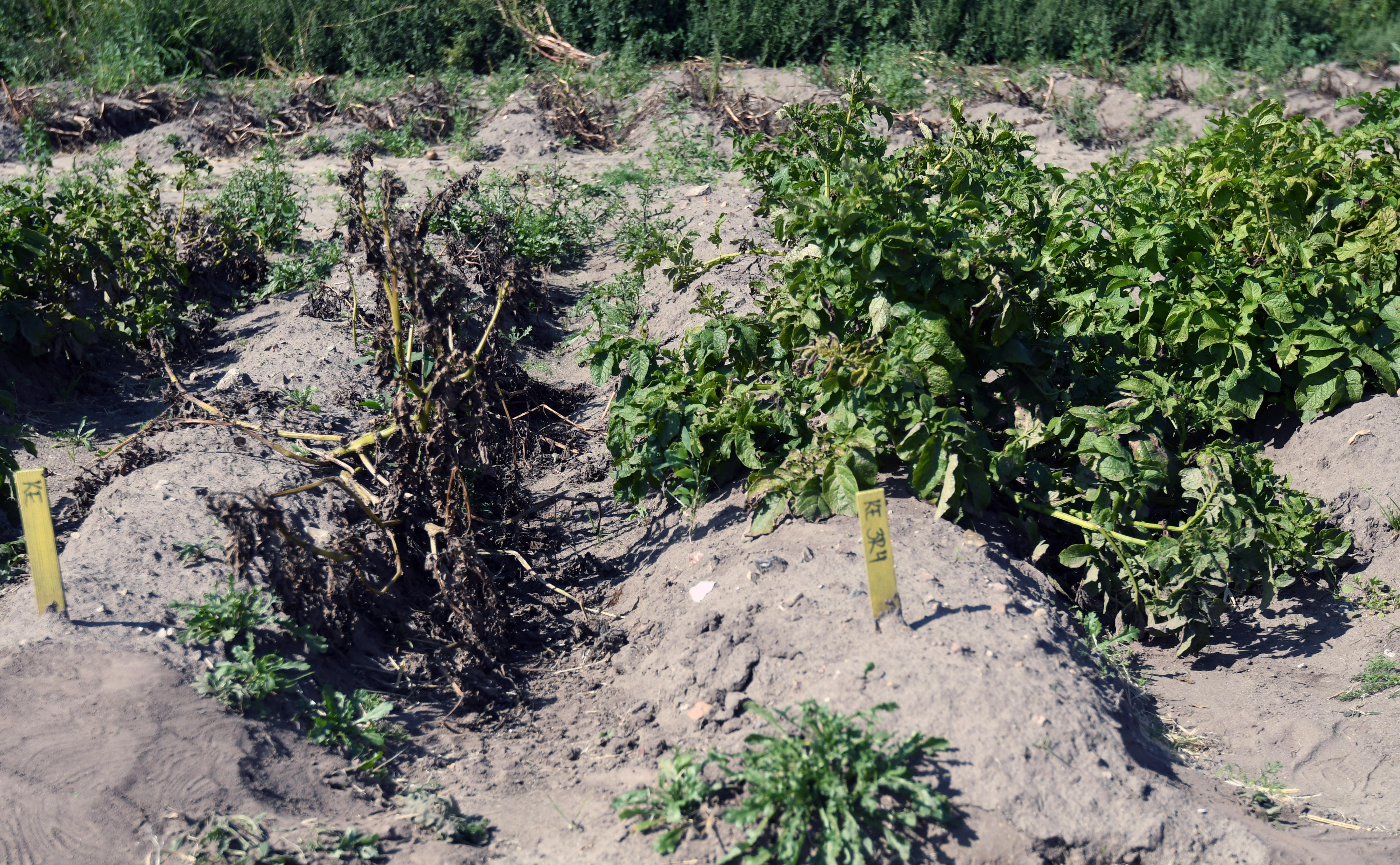 Sveriges Lantbruksuniversitets försöksodling för potatis. Här testas genetiska förändringar till skydd mot potatisbladmögel. Till vänster: King Edward, utan genmodifikation. Till höger: King Edward, med genmodifikation.